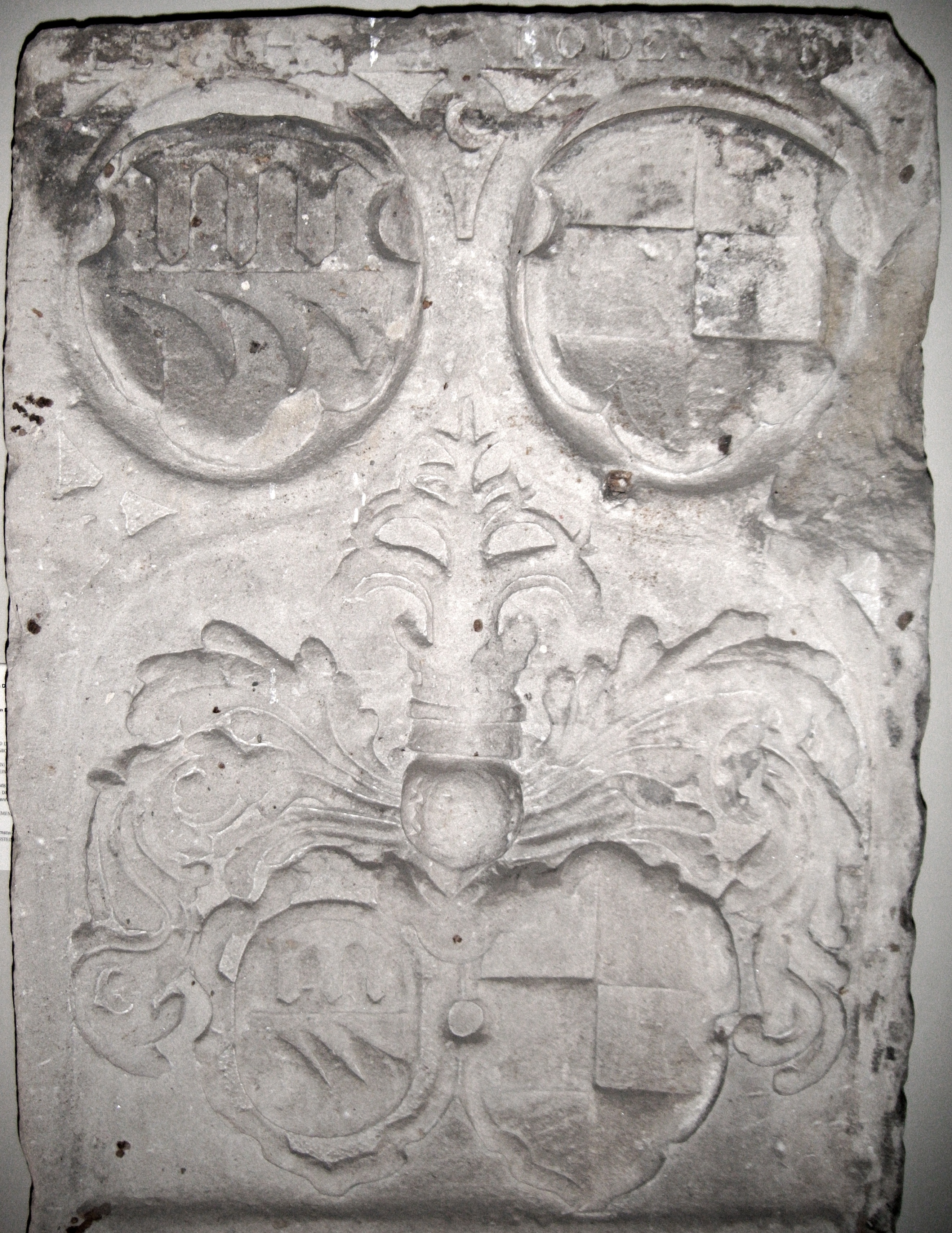 Wappen Lerch von Dirmstein (links) und von Rodenstein. Detail vom Grabstein Agnes Lerch von Dirmstein, geb. von Rodenstein (+ 1617), Schwester des Wormser Bischofs Philipp von Rodenstein, ehemals Paulusstift Worms, heute Stadtmuseum Worms